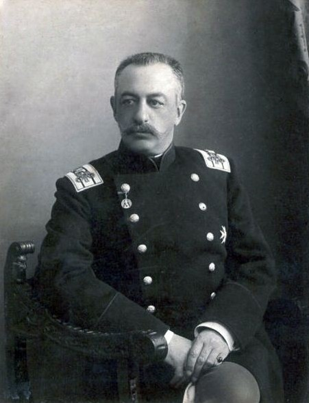 Георгий Дмитриевич Нарышкин (1848—1924)